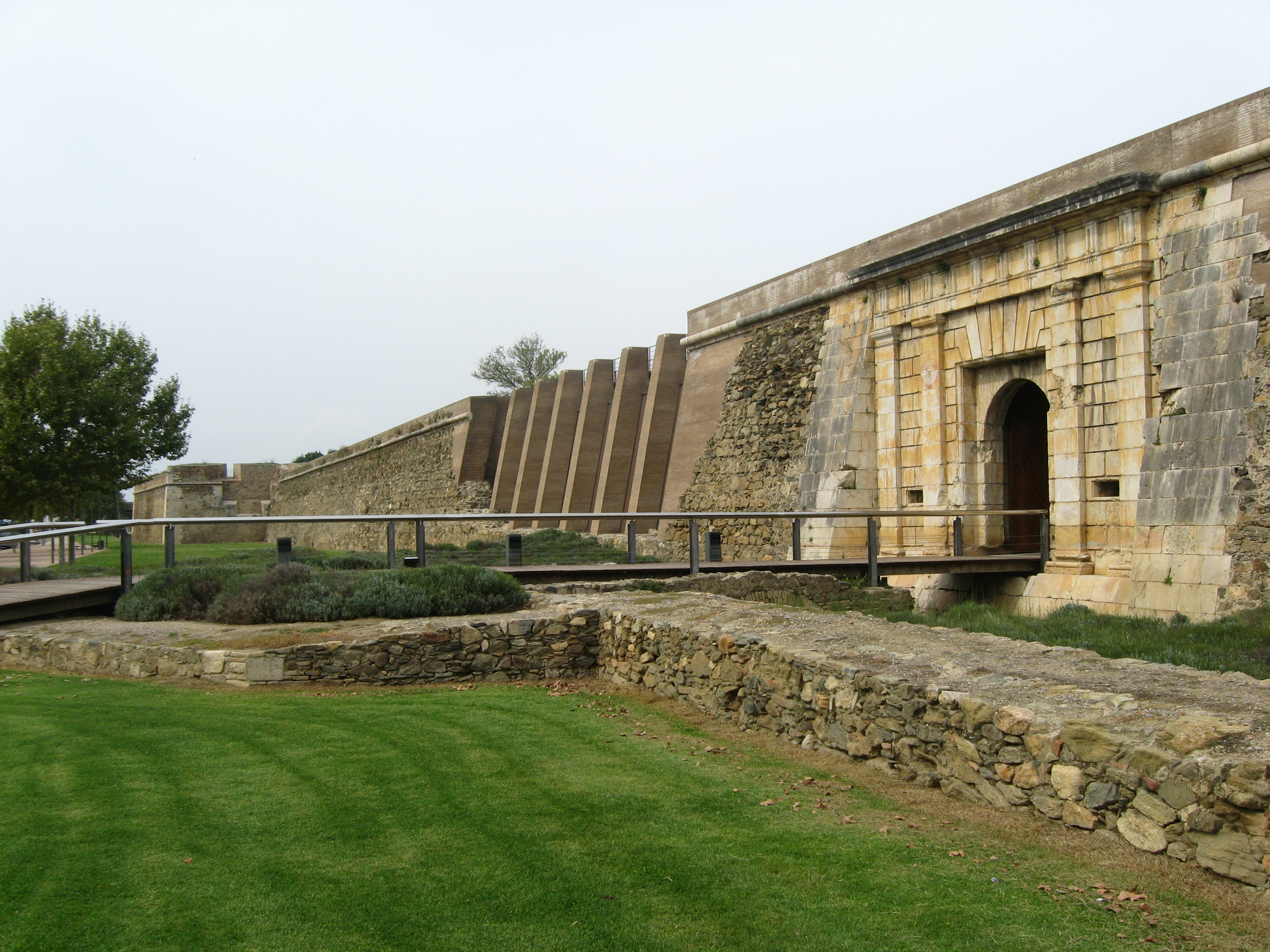 Zitadelle in Roses (Spanien/Katalonien) Datum 23.09.2010 Urheber: Michael Pfeiffer alias Benutzer:Gordito1869 Quelle: privates Fotoarchiv des Urhebers